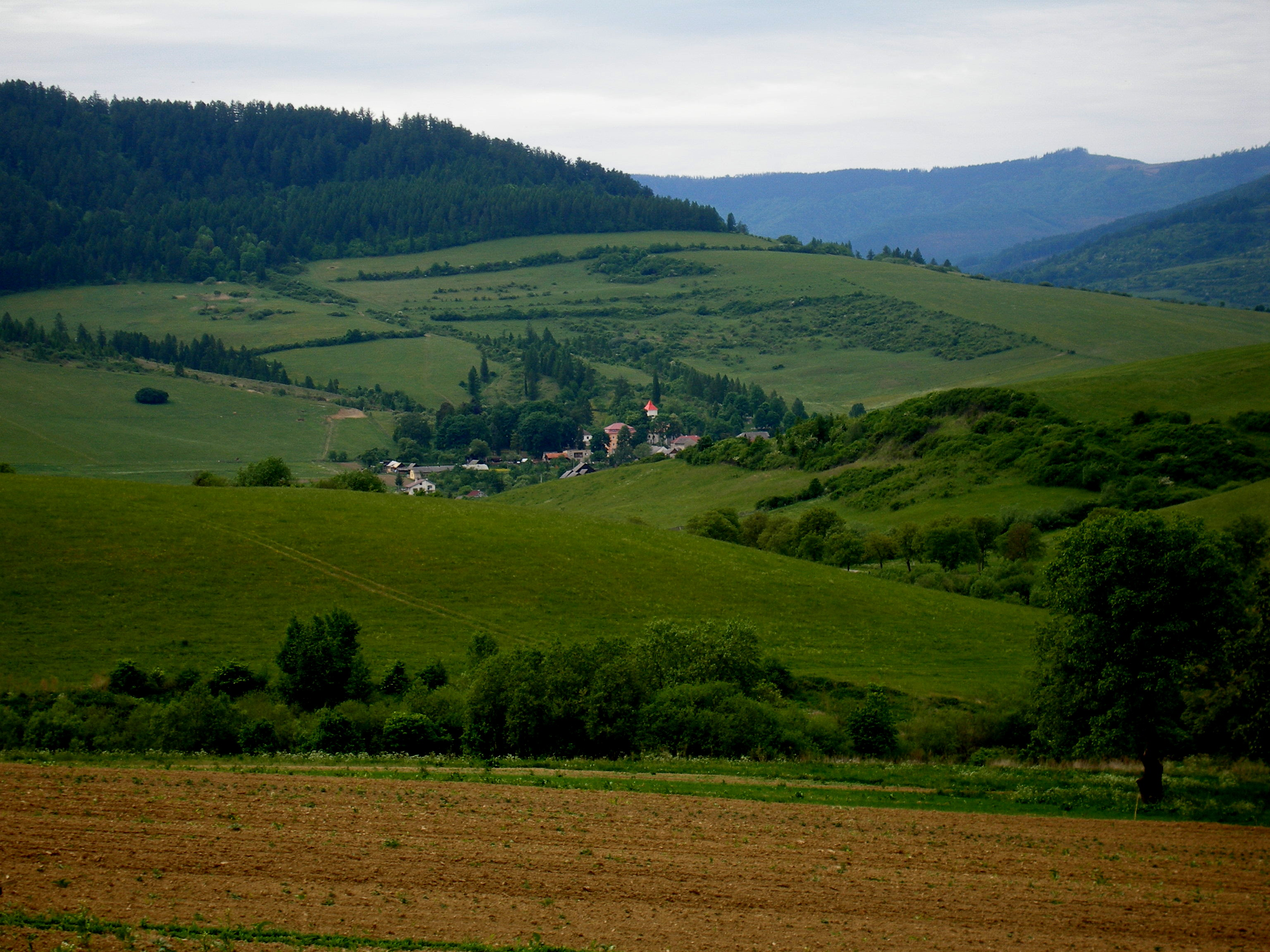 Obec Brezovička okres Sabinov